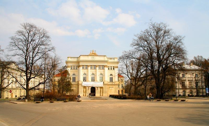 Warszawa (Polska)